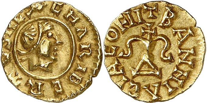 Triens à l'effigie de Charibert II, frappé à Bannaciaco, Banassac (Lozère). Avers : CHARIBERTVS REX tête diadémée à droite, coiffée d’une calotte, dans un cercle intérieur. Revers : +BANNIACIACO FIIT calice à deux anses, surmonté d’une croisette.